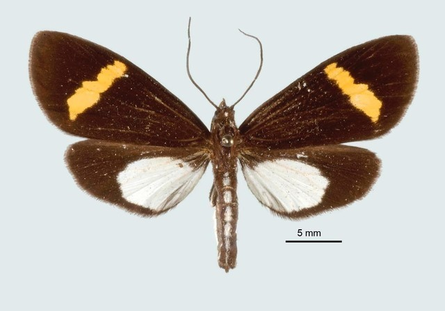 Ephialtias abrupta